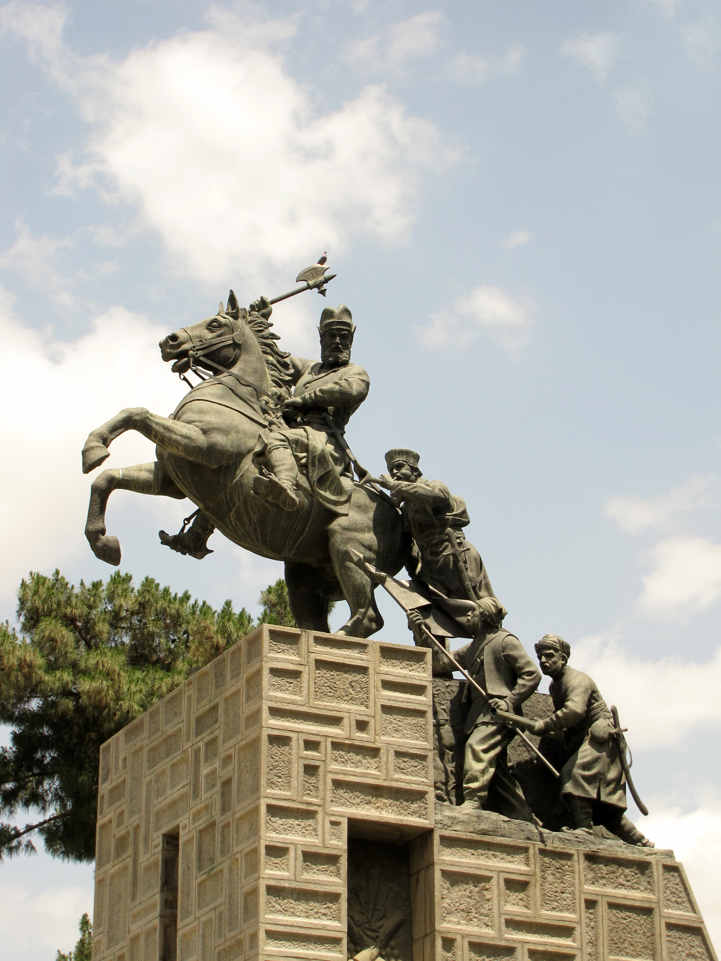 آرامگاه نادرشاه